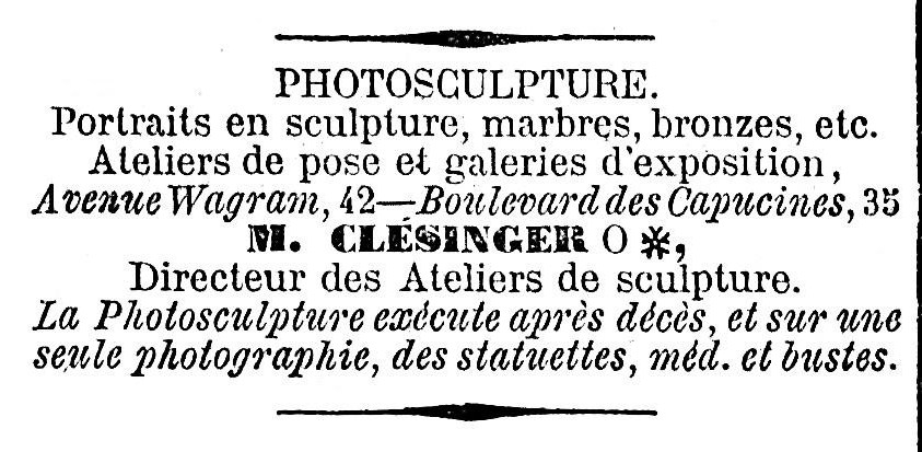 Publicité pour la photosculpture - Auguste Clésinger voit son nom y apparaître.